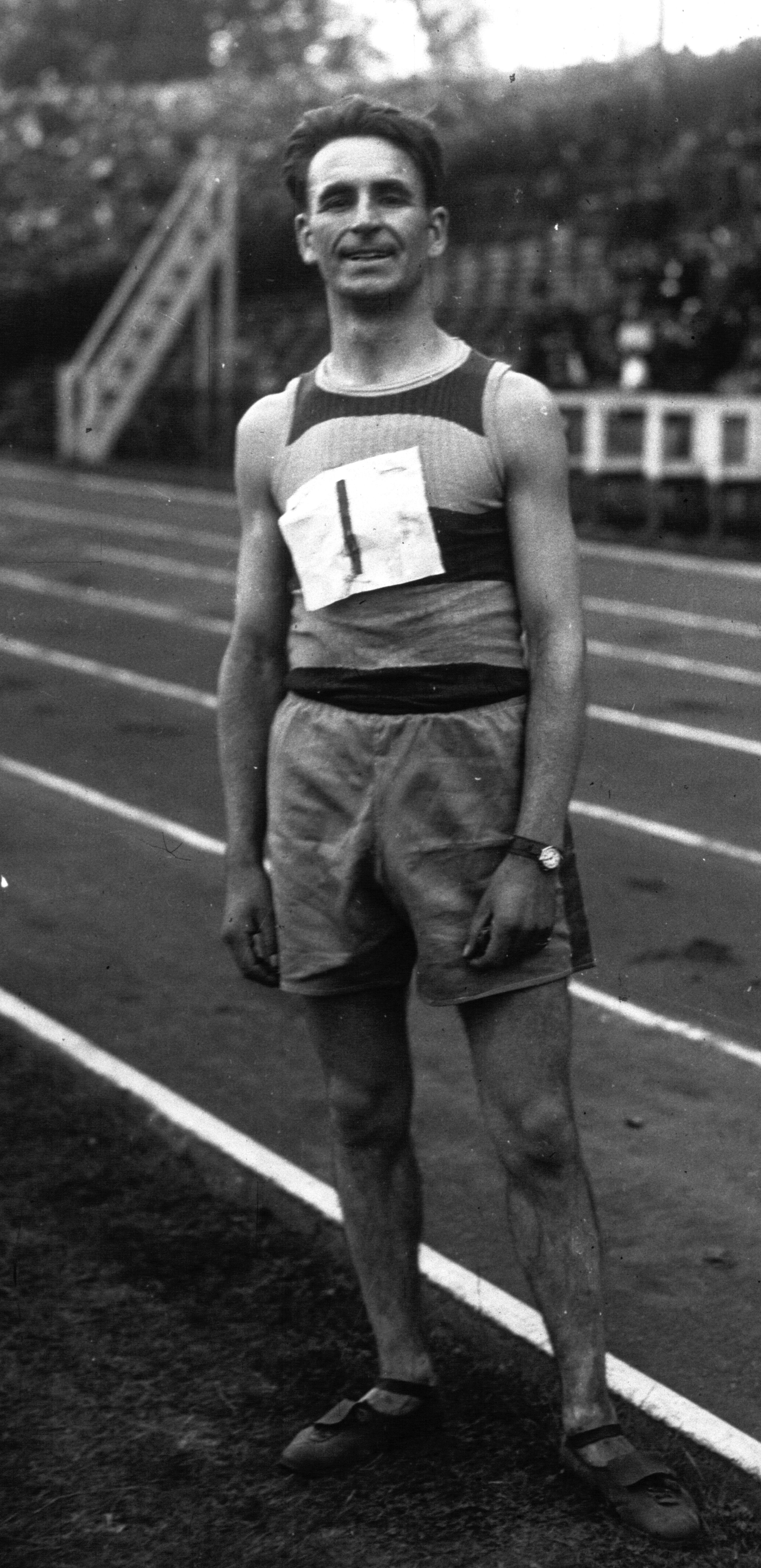 Suède-France athlétisme : Marien, belge gagnant du marathon : [photographie de presse] / Agence Meurisse